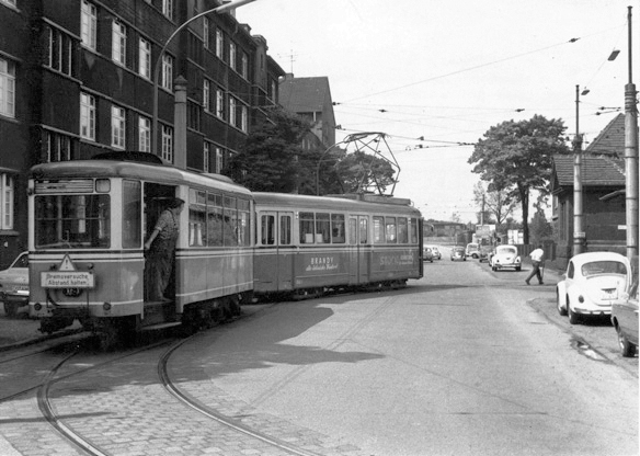 Ansicht Immermannstraße mit Straßenbahnhauptwerkstatt 1972